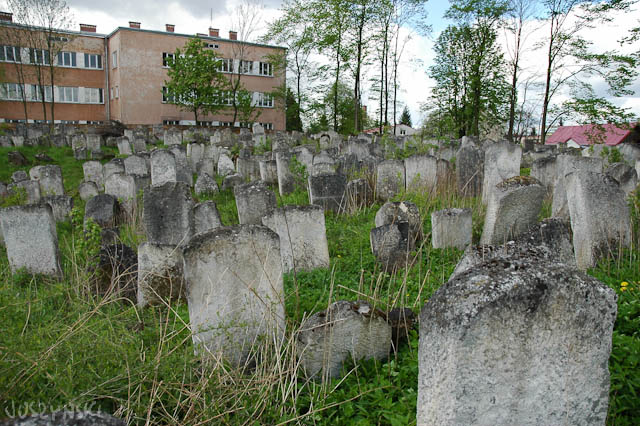 Lubaczów, kirkut